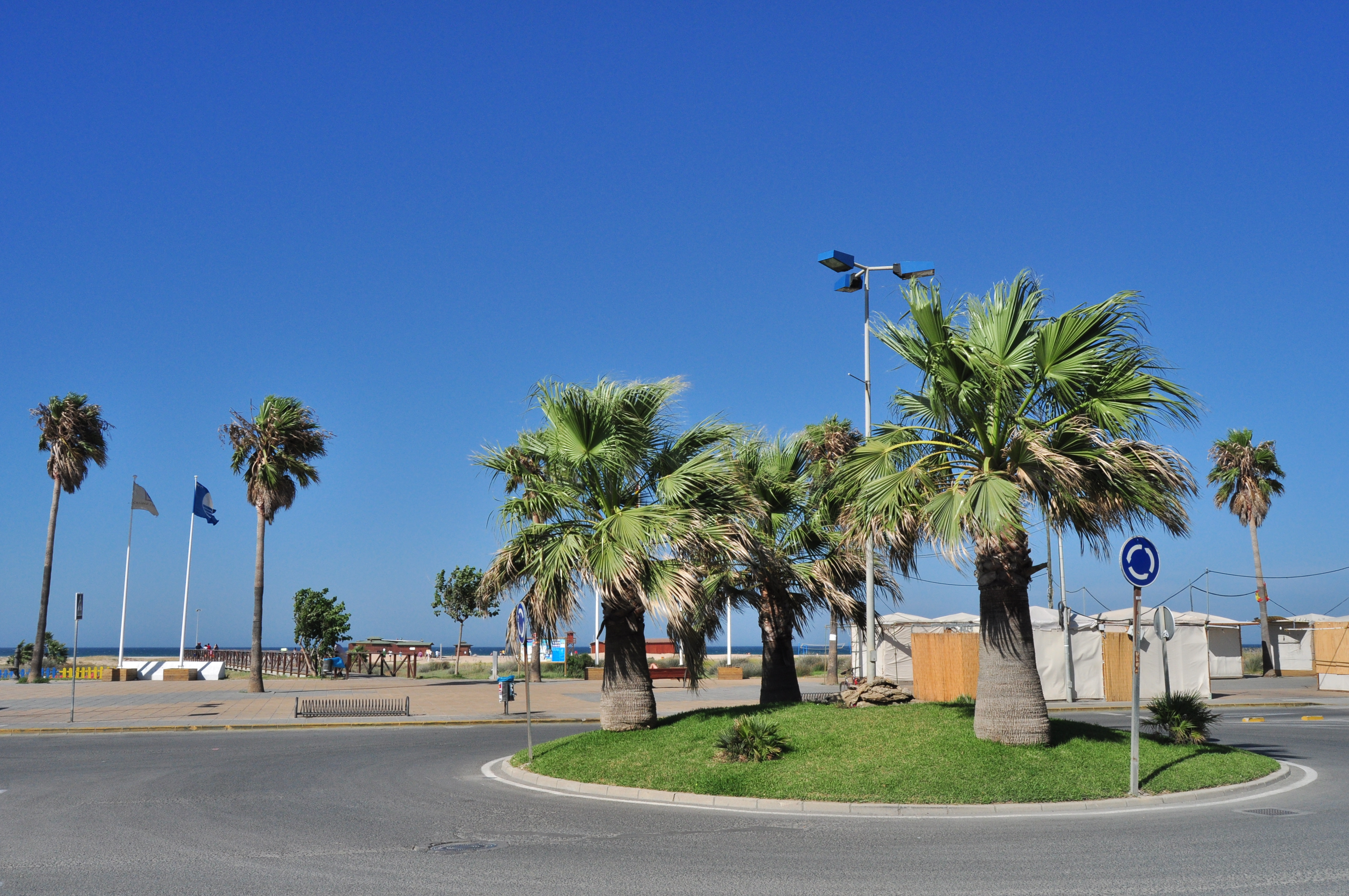 Conil de la Frontera - 008